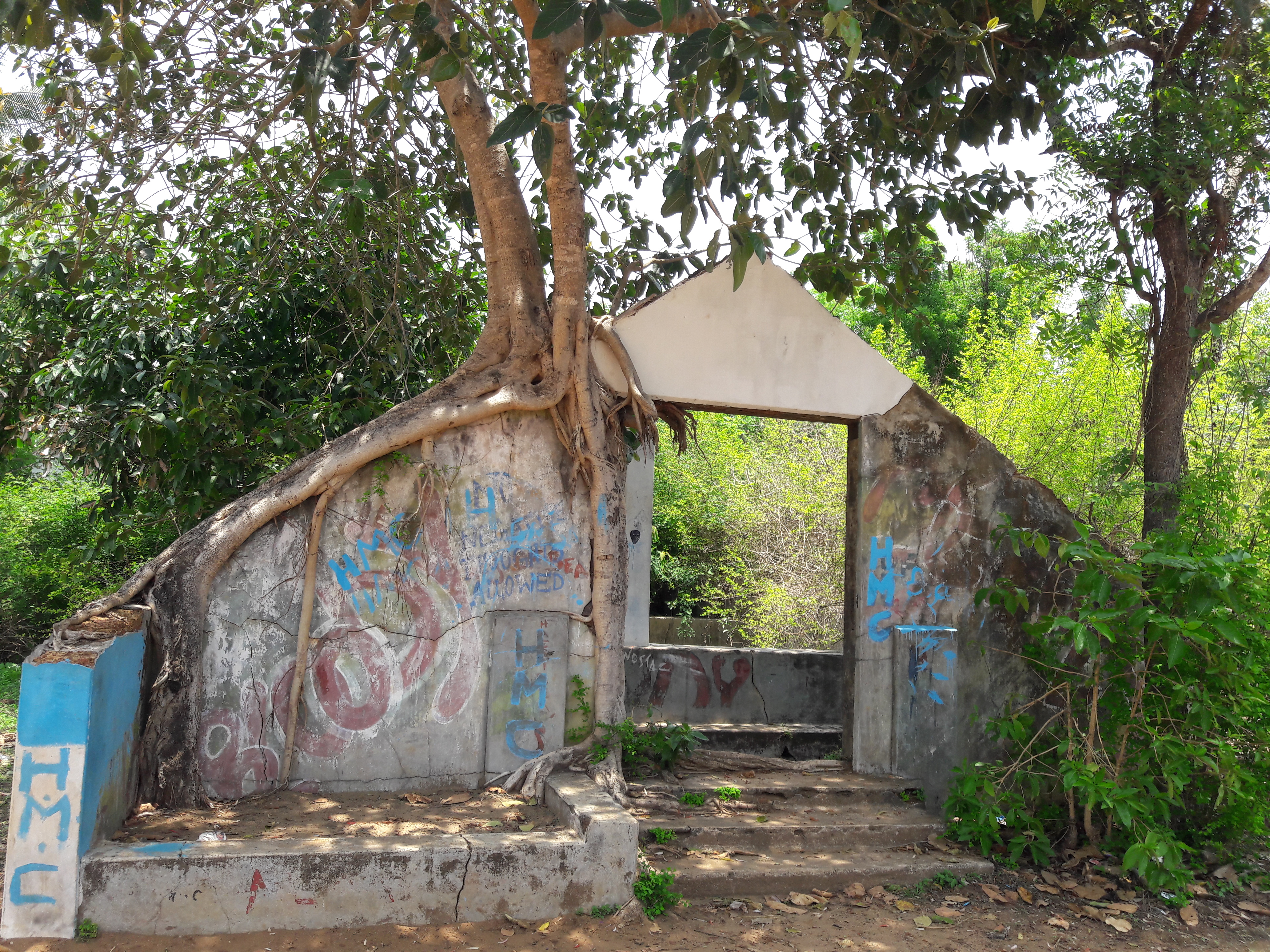 തൃശൂര്‍ ജില്ലയിലെ ചാവക്കാട്ബ്ലാങ്ങാട് പഴയ കെട്ടിടത്തിന്‍റെ മുകളില്‍ വളരുന്ന ഒരു പേരാല്‍ മരം.Devil tree ശാസ്ത്രീയ നാമം Ficus benghalensis കുടുംബം Moraceae.